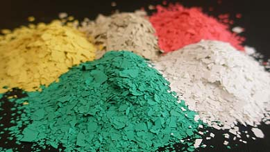 DecoChips Akrylátové chipsy , Různé barvy, velikost 3